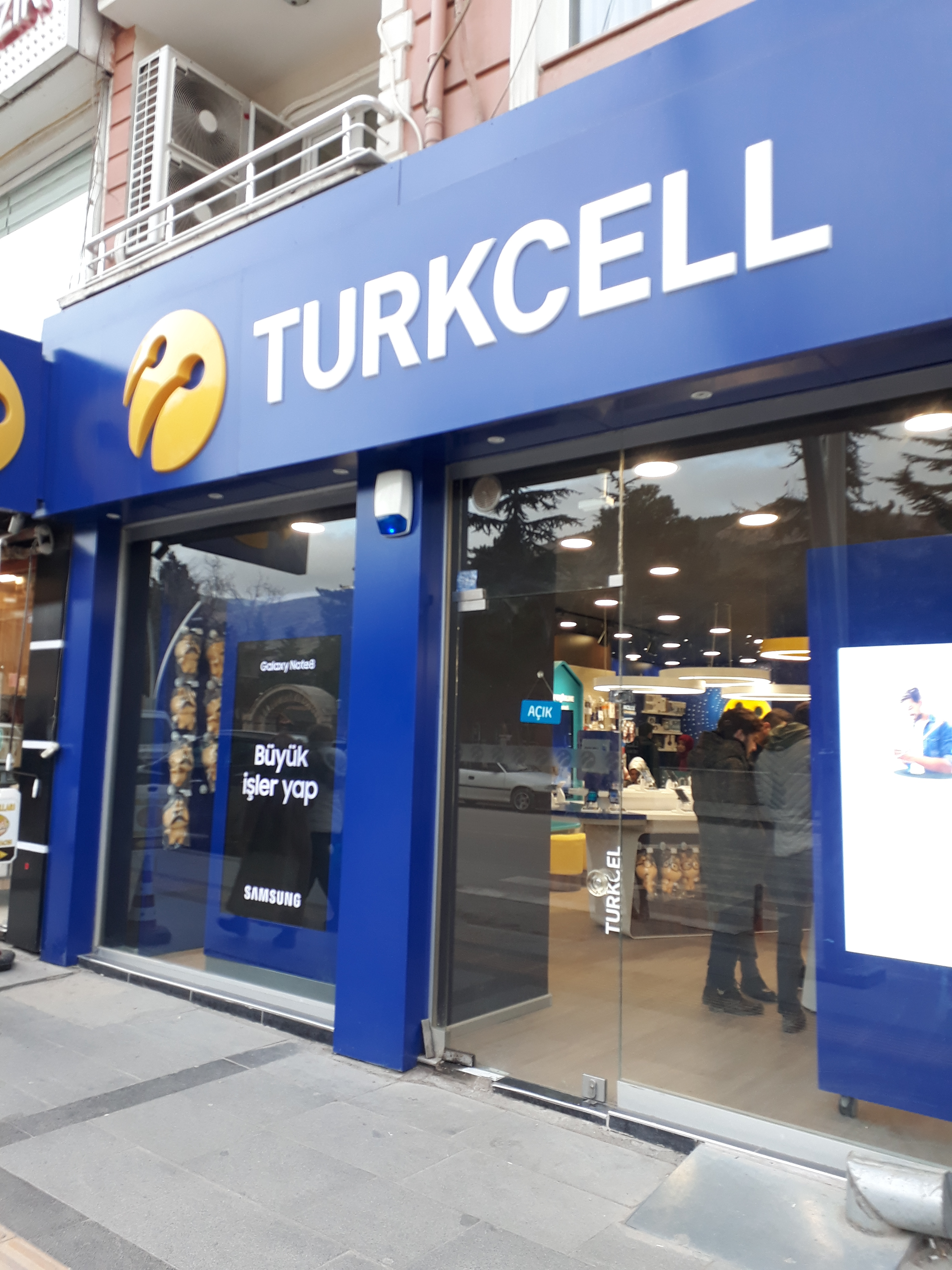 Turkcell akıllı mağaza, Türkiye.